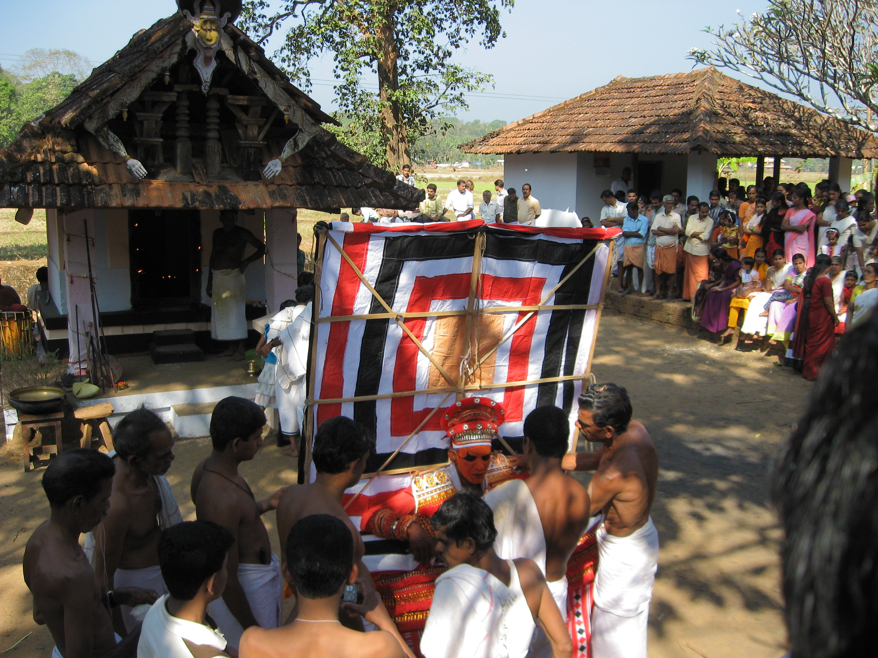 ബ്ലാത്തൂർ താഴെപള്ള്യത്ത് കോട്ടത്തിൽ വലിയ മുടിയുള്ള തമ്പുരാട്ടി കെട്ടി തുടങ്ങുന്ന ചിത്രം.